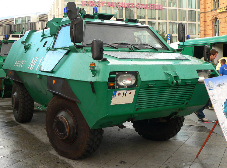 Polizeisonderfahrzeug SW 4, Hersteller Thyssen und DB AG